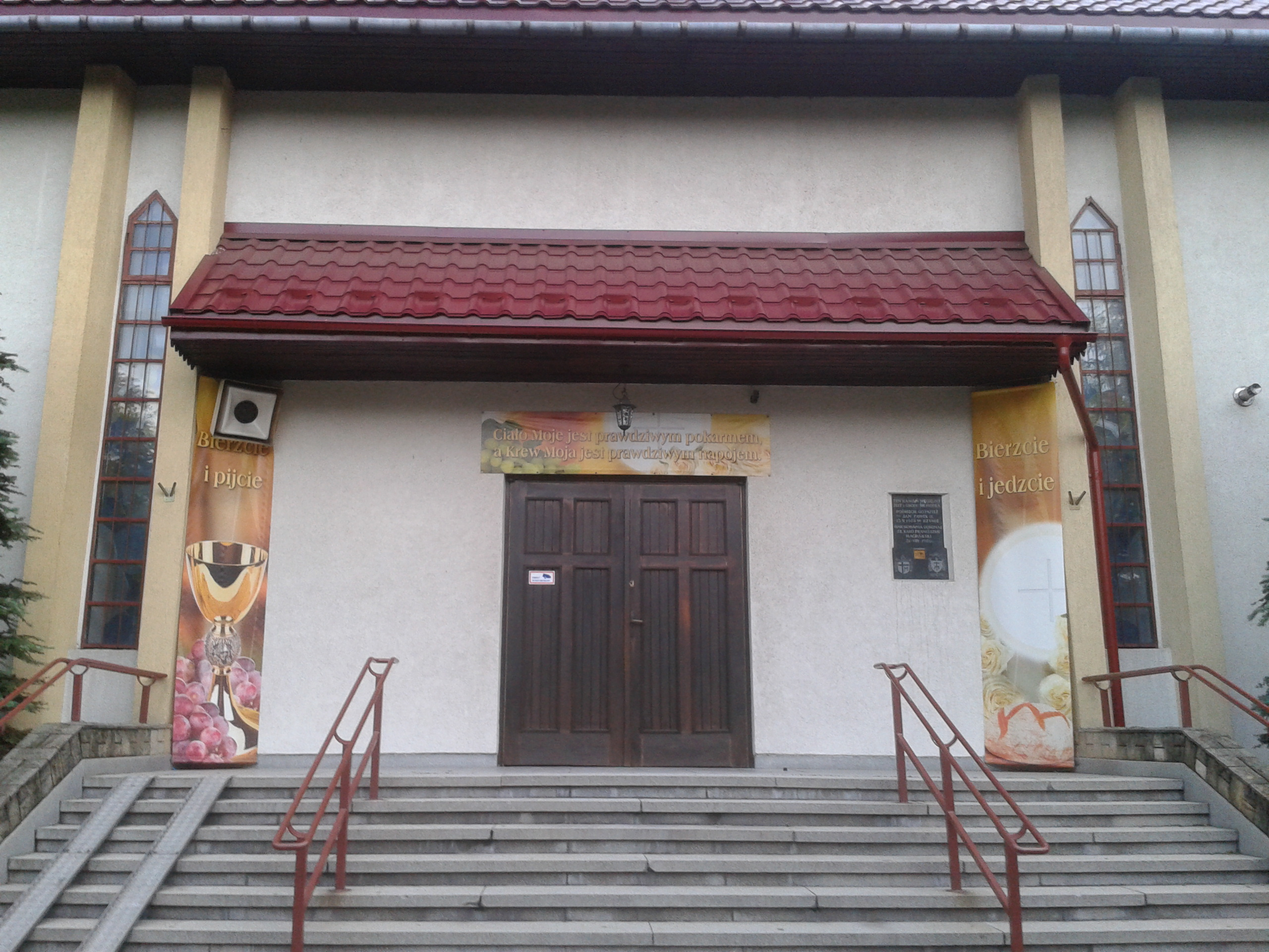 Kosciół Podwyższenia Krzyża Świętego w Psarach